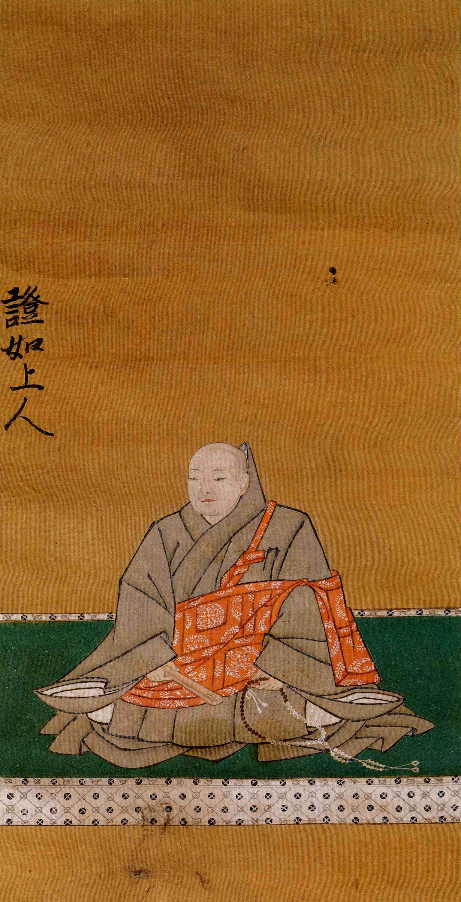 証如影像